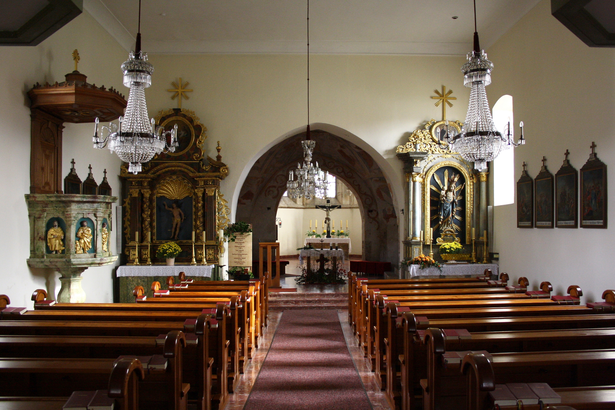 Innenansicht (Richtung Altar) der Pfarrkirche "St. Peter im Moos" von Muthmannsdorf in der niederösterreichischen Gemeinde Winzendorf-Muthmannsdorf.